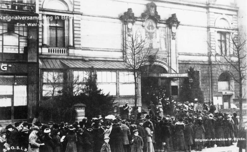 Zentralbild 3.3.1953 Wahl zur Nationalversammlung in Berlin. Text auf Foto(vorderseite) Nationalversammlung in Berlin. Eine Wahl-Polonaise. Originalaufnahme von W. Gircke